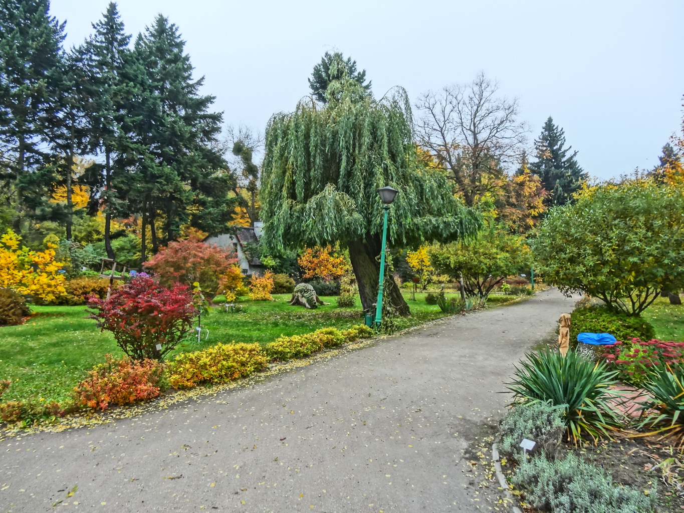 Ogród Botaniczny Uniwersytetu Kazimierza Wielkiego w Bydgoszczy